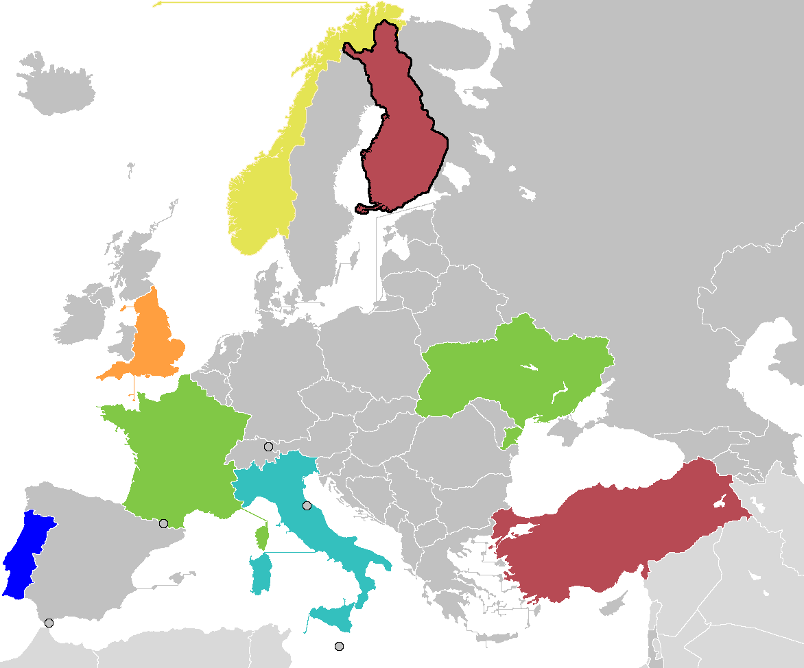 Места команд на ЕВРО 2018 U19